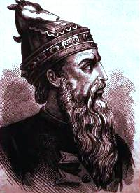 Gjergj Kastrioti Skanderbeg